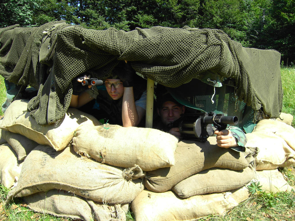 Bunker 5-06-2006.jpg